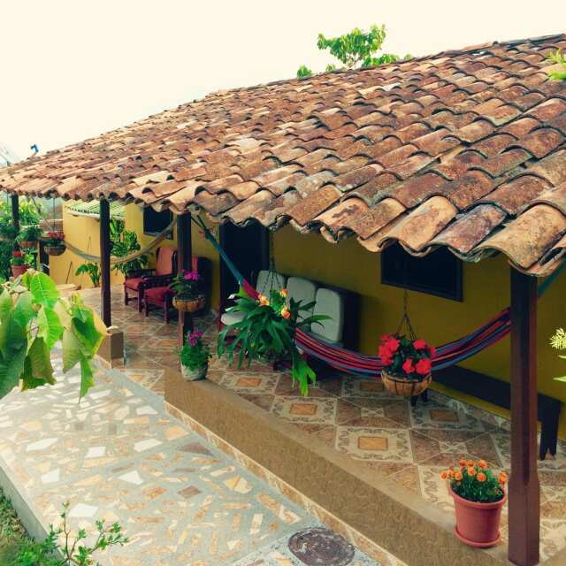 El municipio de Yalí cuenta con muchos lugares de interés donde se destacan diferentes tipos de casas, importantes joyas arquitectónicas se pueden encontrar cuando se hace un recorrido a través de sus calles.